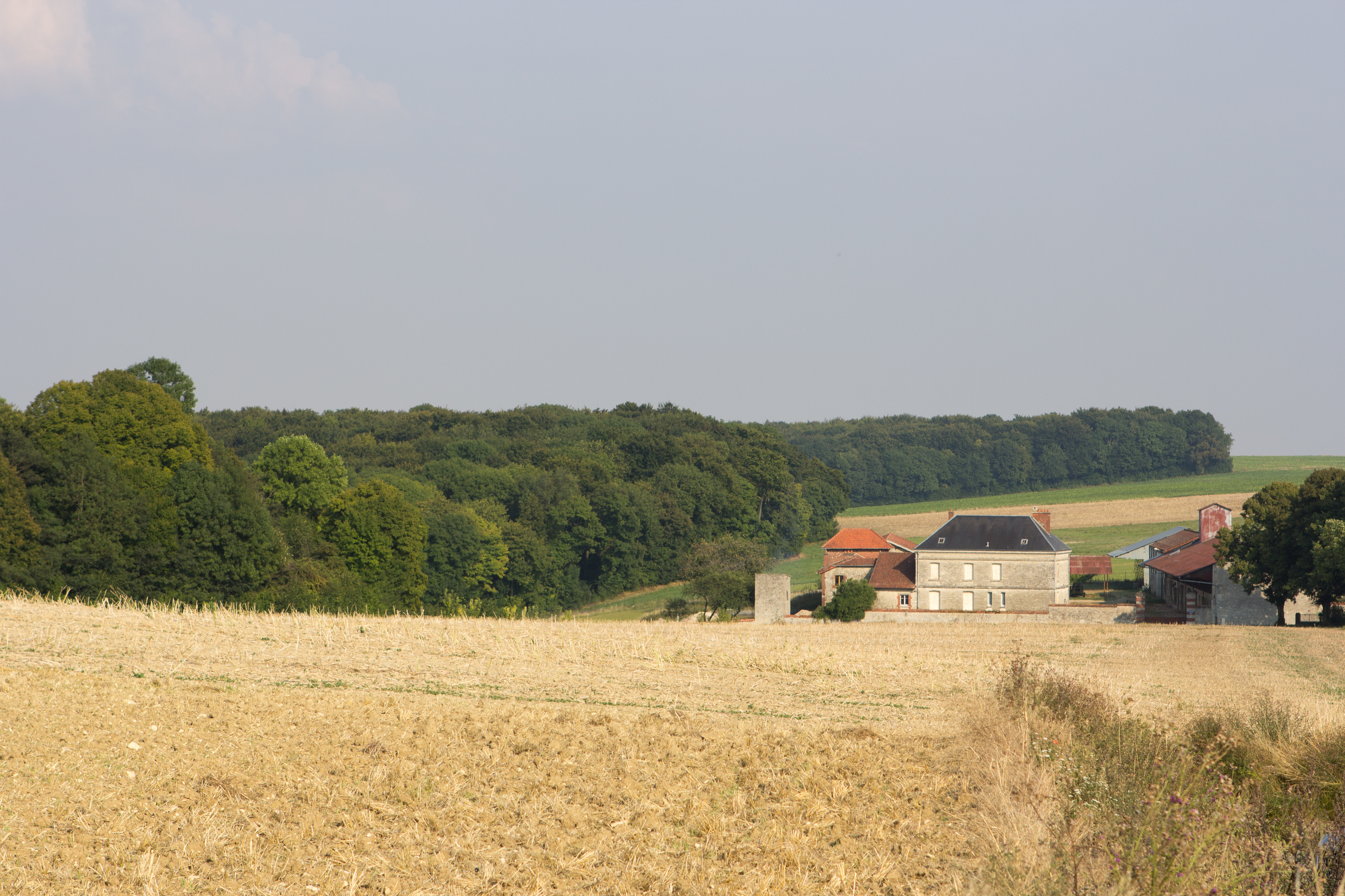 Hurtebise, Chemin des Dames, Bouconville-Vauclair , Aisne, France